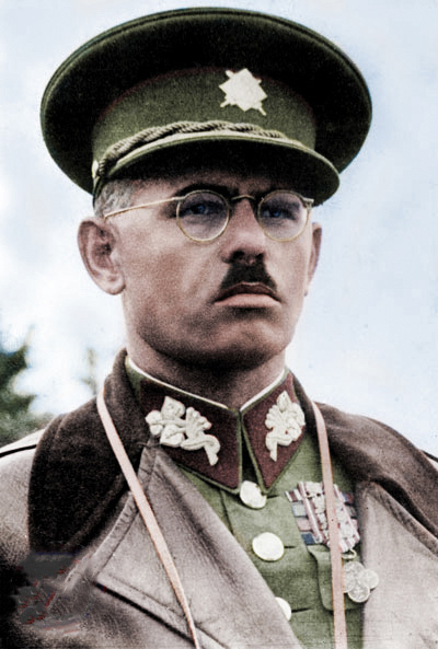 Vojtěch Luža na fotografii z jednoho cvičení čs. armády; cca 1936